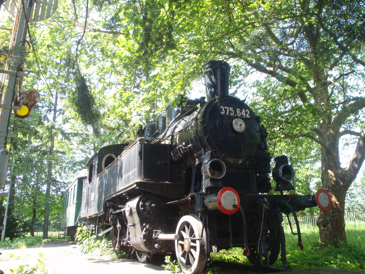 Lokomotivdenkmal in Güns, bei ehemalige MAV Kinderanstalt